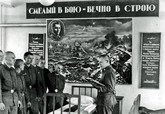 Рота связи 120 ГМСП